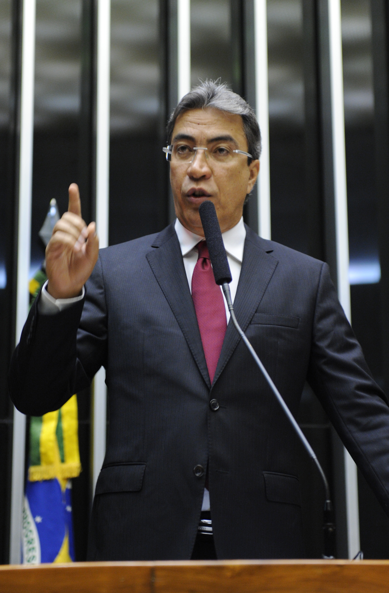 Português do Brasil: Marcelo Deda (governador de Sergipe) - Sessão Solene em Homenagem aos 191 anos da Emancipação Política do Estado de Sergipe